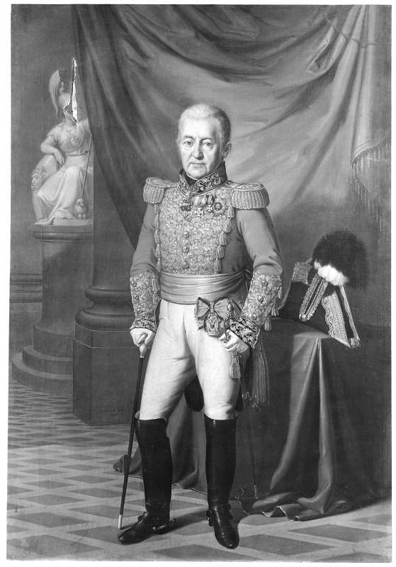 Bildnis in Hofchargenuniform (ganze Figur stehend, etwas von links; barhaupt; mit Ordensdekor; Rechte auf Stock; Zweispitz zur Linken auf verhangenem Tisch; im Hintergrund Draperie vor Säule, weiter hinten links Sitzfigur der Pallas Athene auf Rundsockel). Signiert und datiert Gemälde von (Johann) Ziegler.